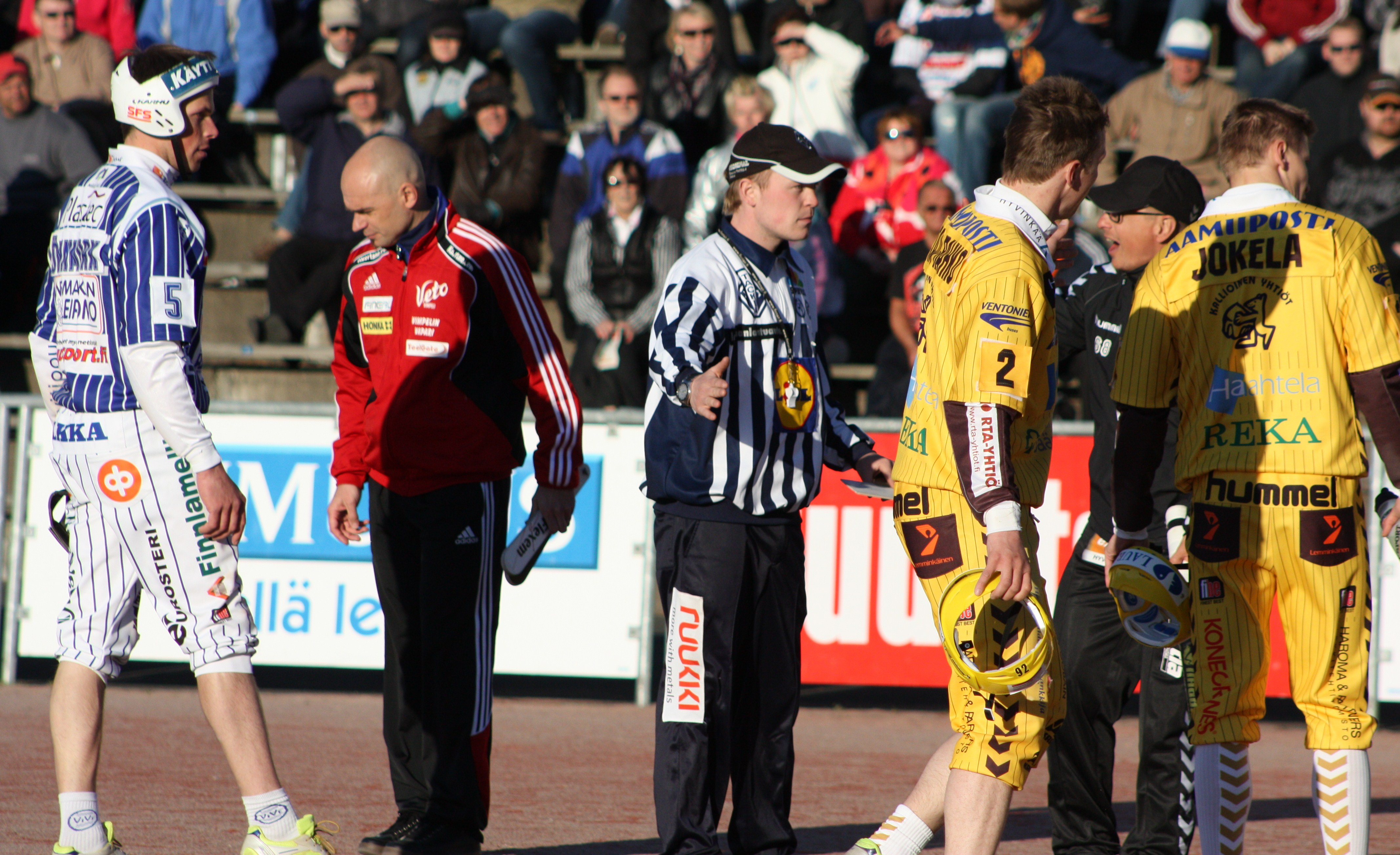 Tahko-Vimpeli 26.5.2011